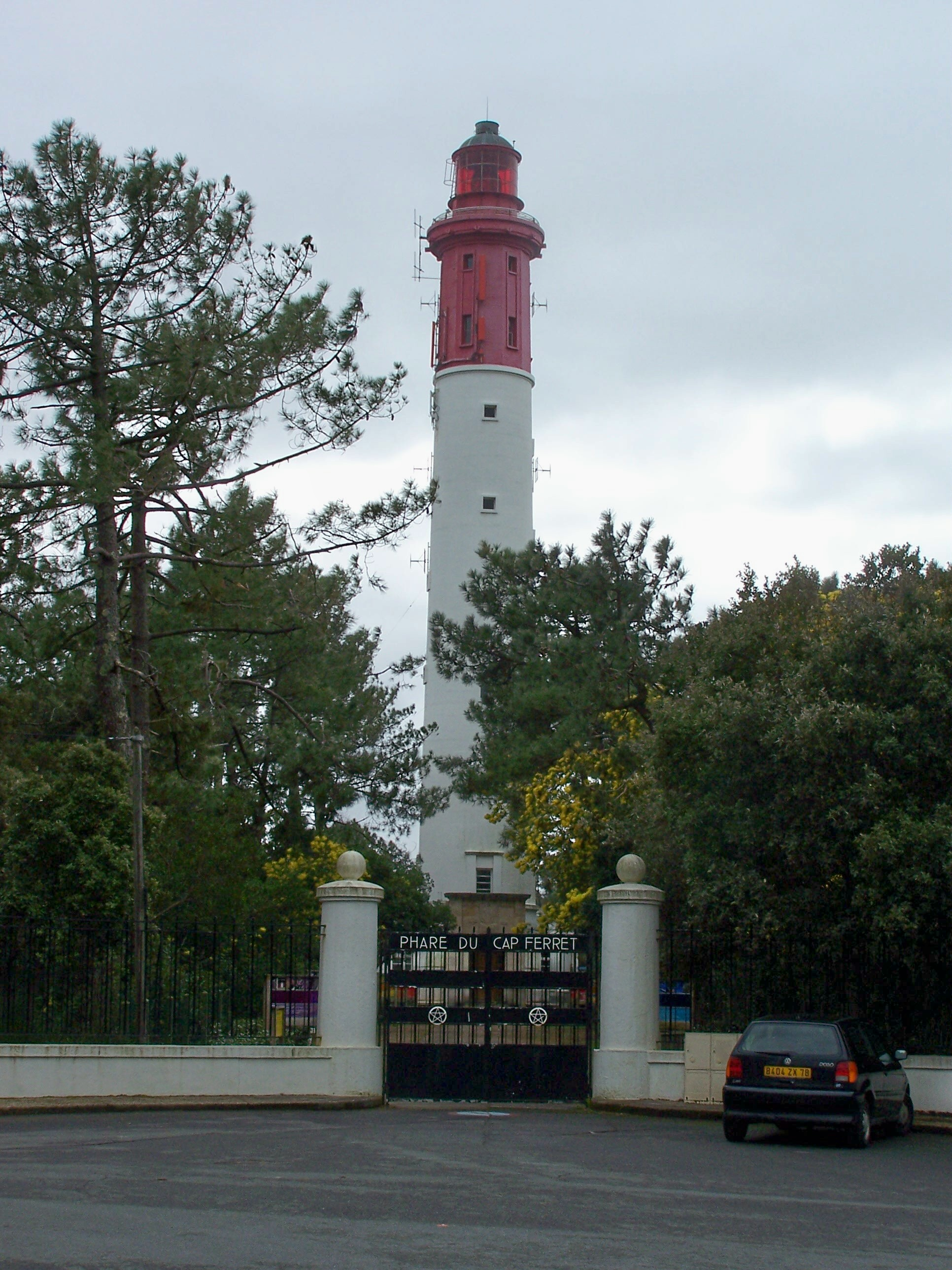 Phare du Cap-Ferret à Lège-Cap-Ferret, Gironde, France